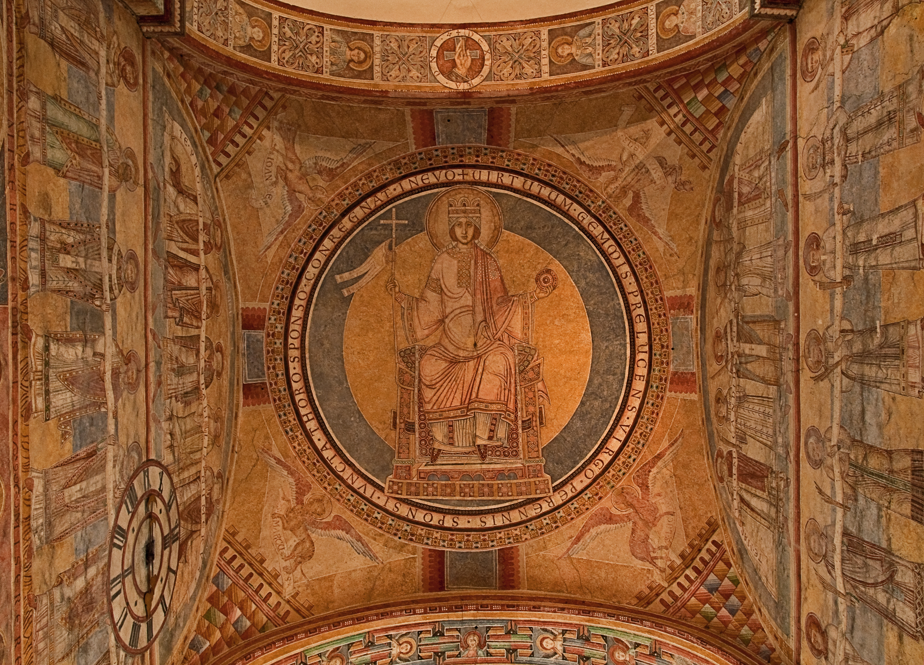 "Ecclesia" - Deckenmedaillon im Hauptchor von St. Georg - Kloster Prüfening